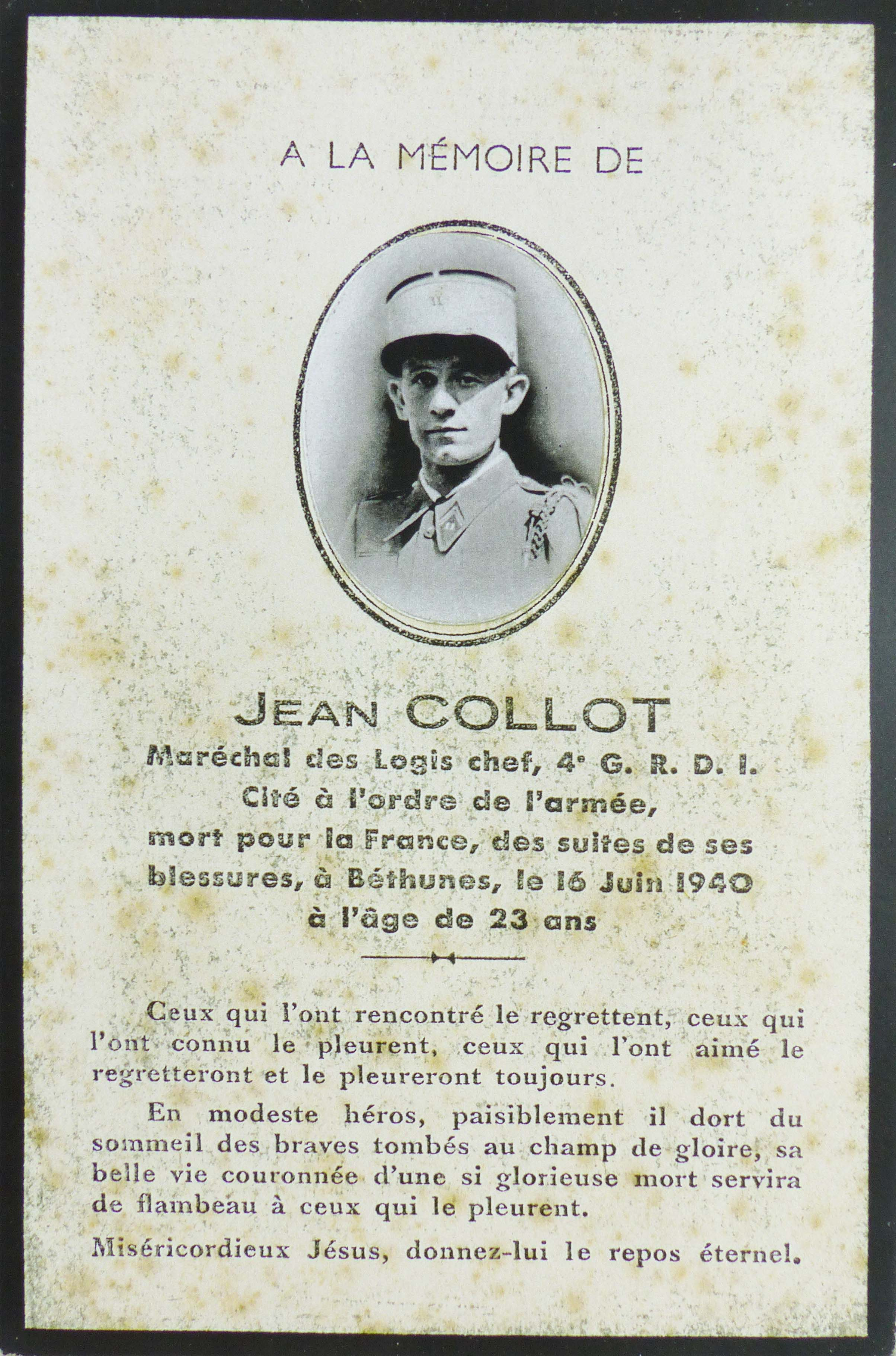 Image-souvenir de Jean Collot (11e Chasseurs / 4e GRDI de Vesoul) mort pour la France le 16 juin 1940 à Béthune